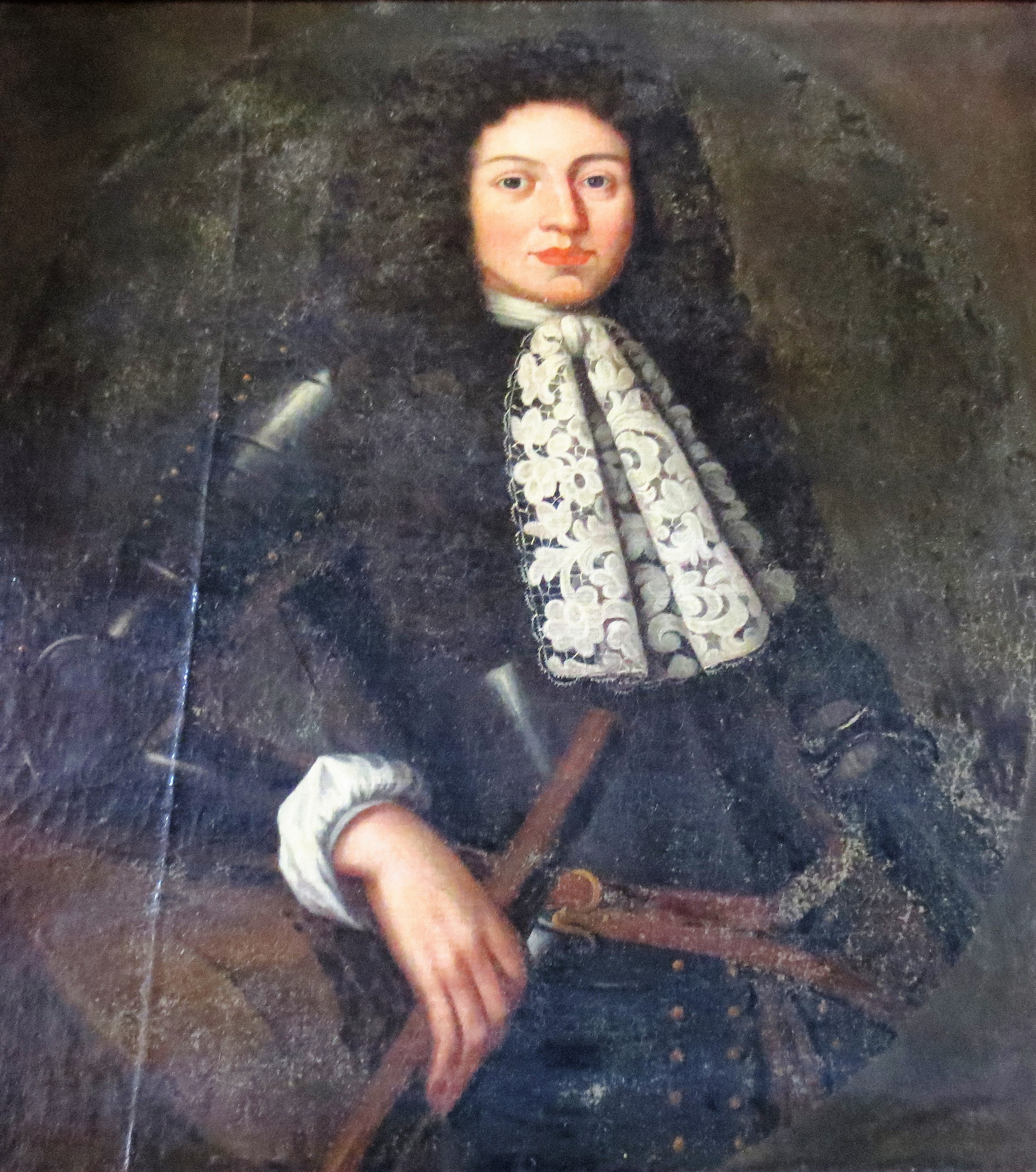 Gemälde von Ludwig Casimir zu Sayn-Wittgenstein-Berleburg (1598-1643) Unbek. Künstler, ca. 1620